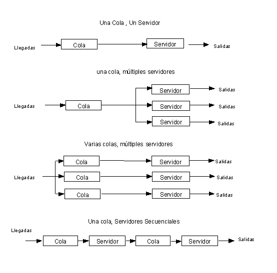 estructuras típicas de colas